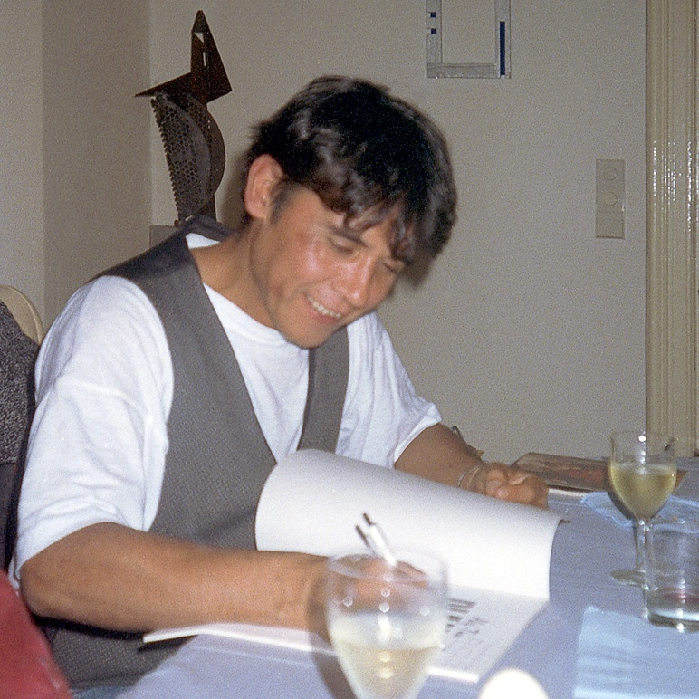 Der Chilenische Theaterregisseur und -direktor Andrés Pérez Araya in Berlin 1994 zu Gast bei mir / Chilenean theatre and stage director Andrés Pérez Araya during his stay in Berlin, Germany 1994 at my home